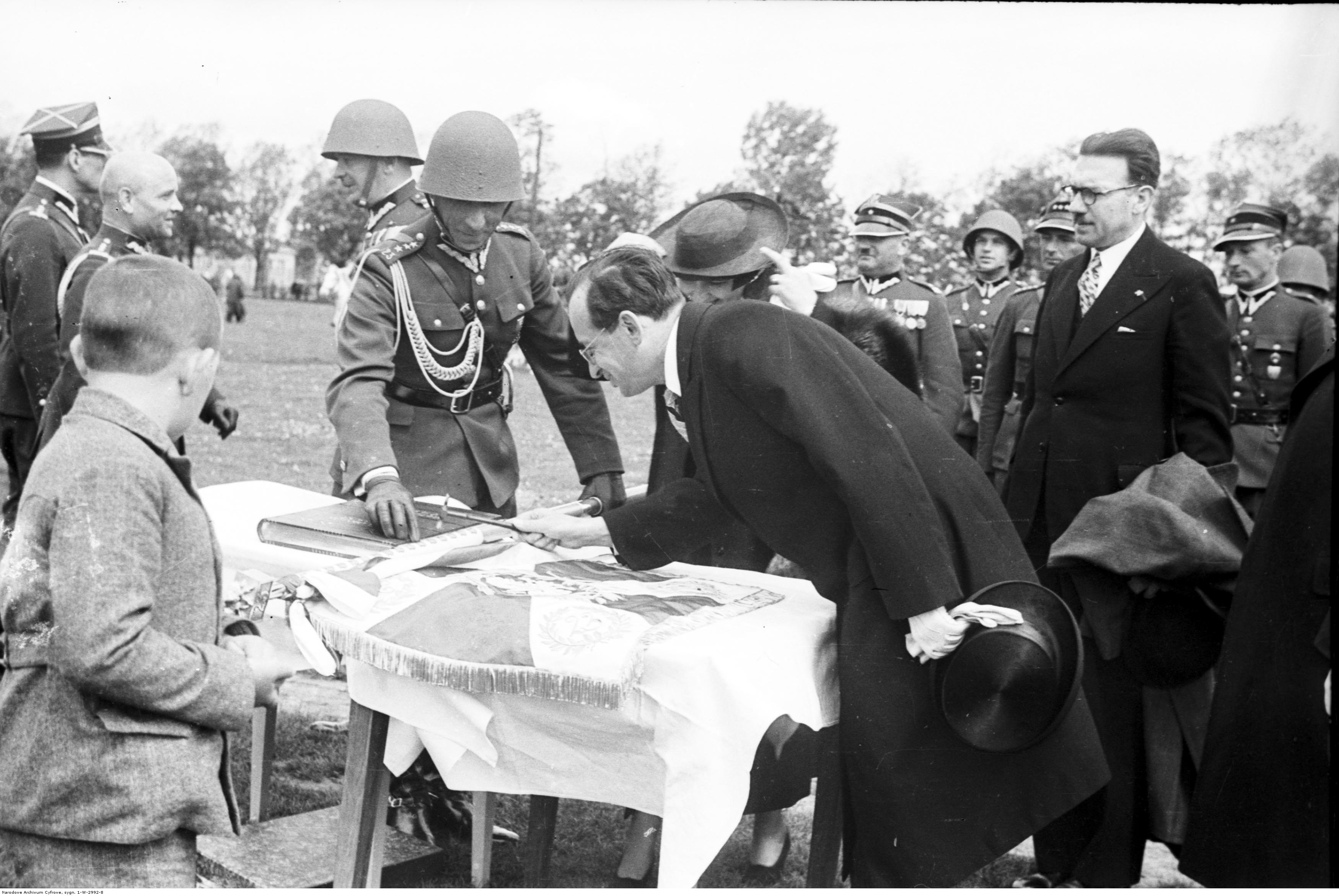 Wręczenie i poświęcenie sztandarów pułkom artylerii na krakowskich Błoniach 29 maja 1938. Wojewoda kielecki Władysław Dziadosz wbija pamiątkowy gwóźdź w drzewce sztandaru 23 Pułku Artylerii Lekkiej. Obok widoczna księga pamiątkowa. Koncern Ilustrowany Kurier Codzienny - Archiwum Ilustracji. Sygnatura: 1-W-2992-8